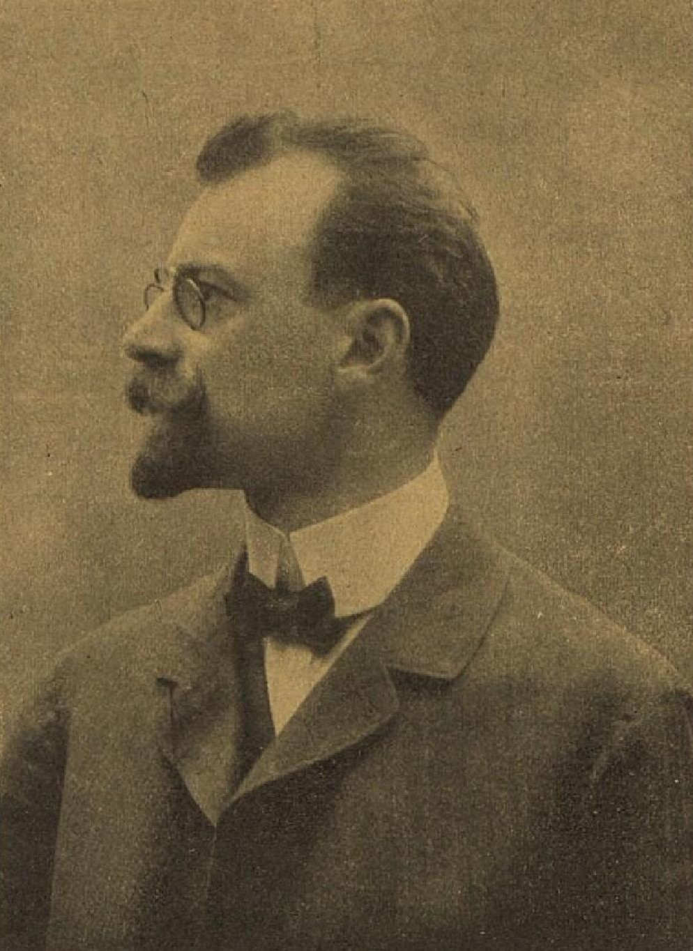 Antonín Hubka (1872-1919), rakouský menšinový aktivista a politik